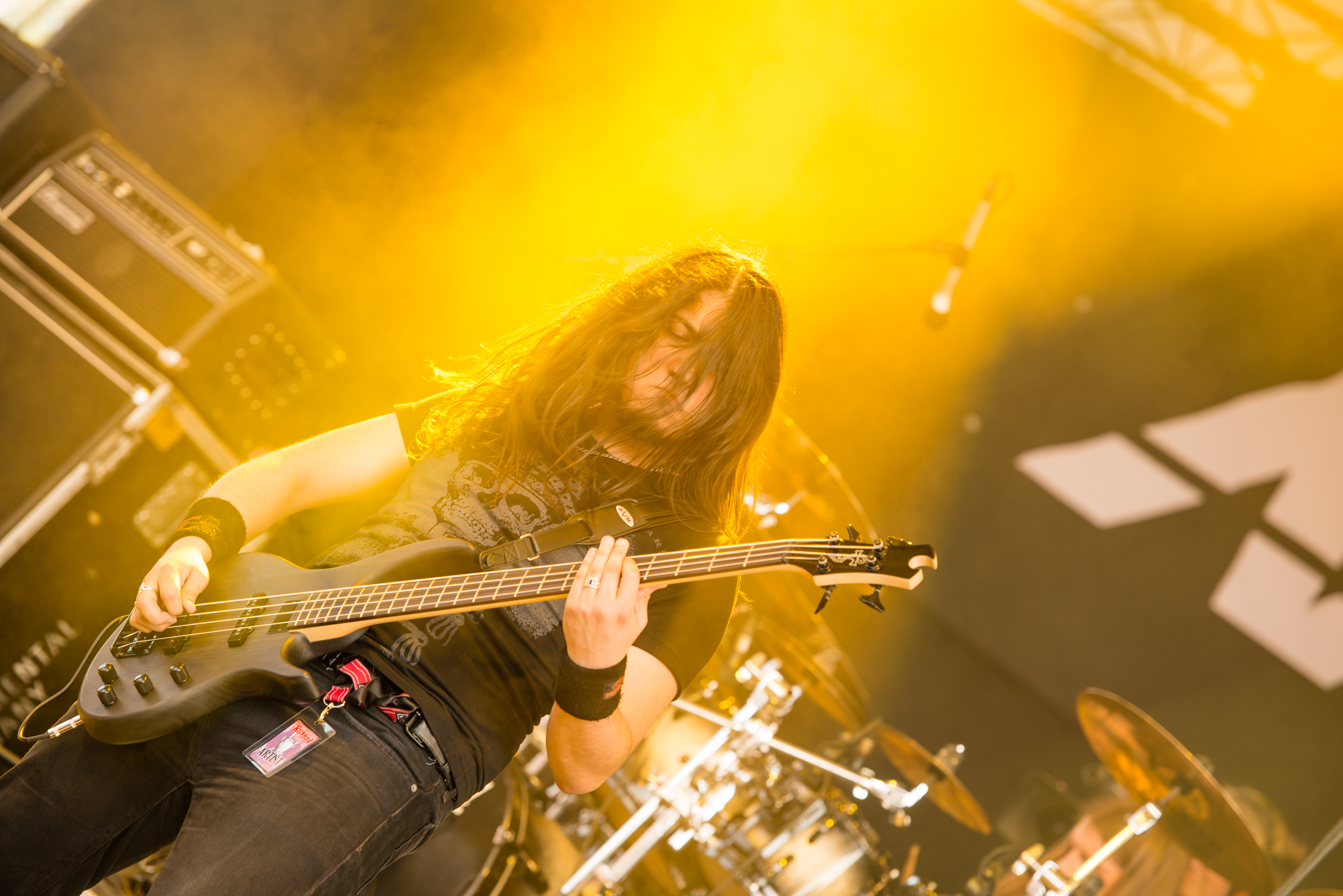 'Rock Hard Festival 2014 - Gelsenkirchen': 'Annihilator'